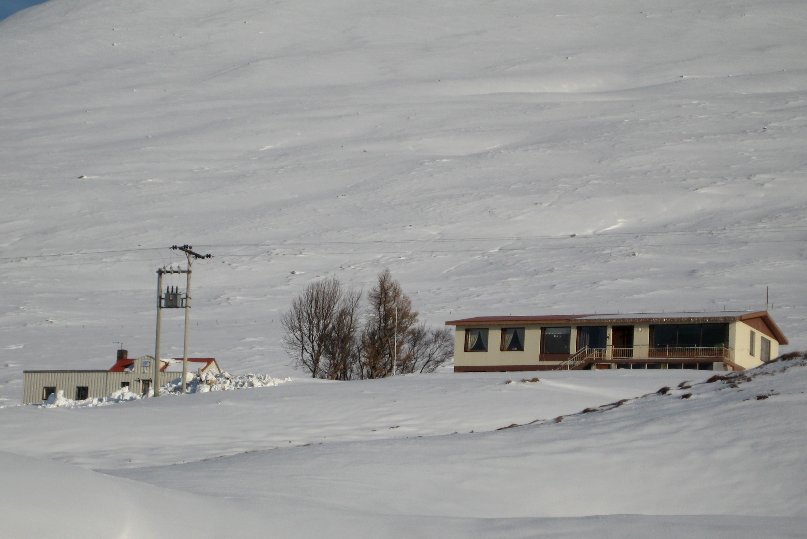 Hofsárkot í Svarfaðardal